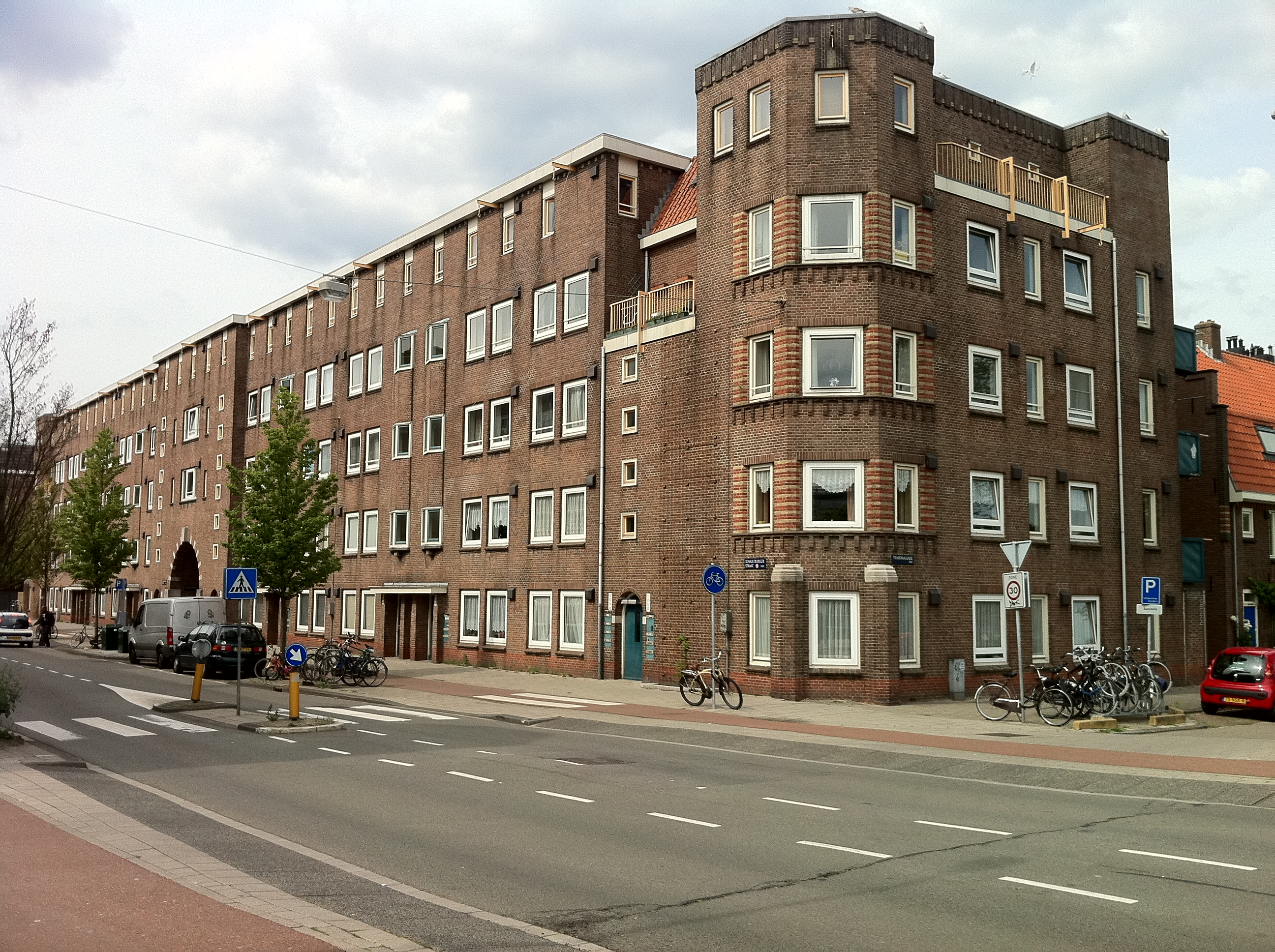 Complex gemeentewoningen in Transvaalbuurt Amsterdam van architect Jan Gratama aan de Schalk Burgerstraat, hoek Transvaalkade